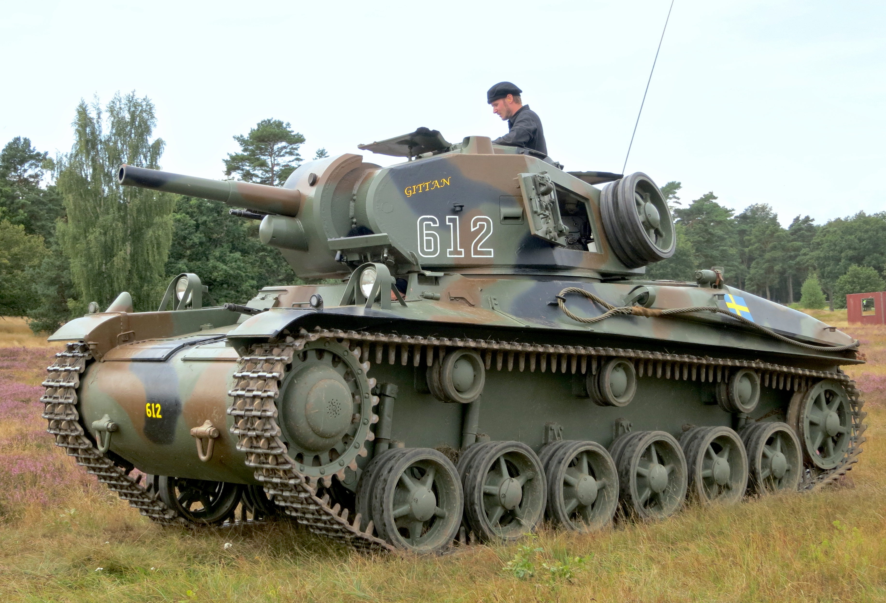 Stridsvagn modell 42 vid P7 Regementets dag 2012